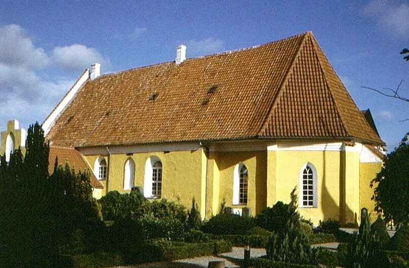 Birket Kirke i Danmark. Birket kirke